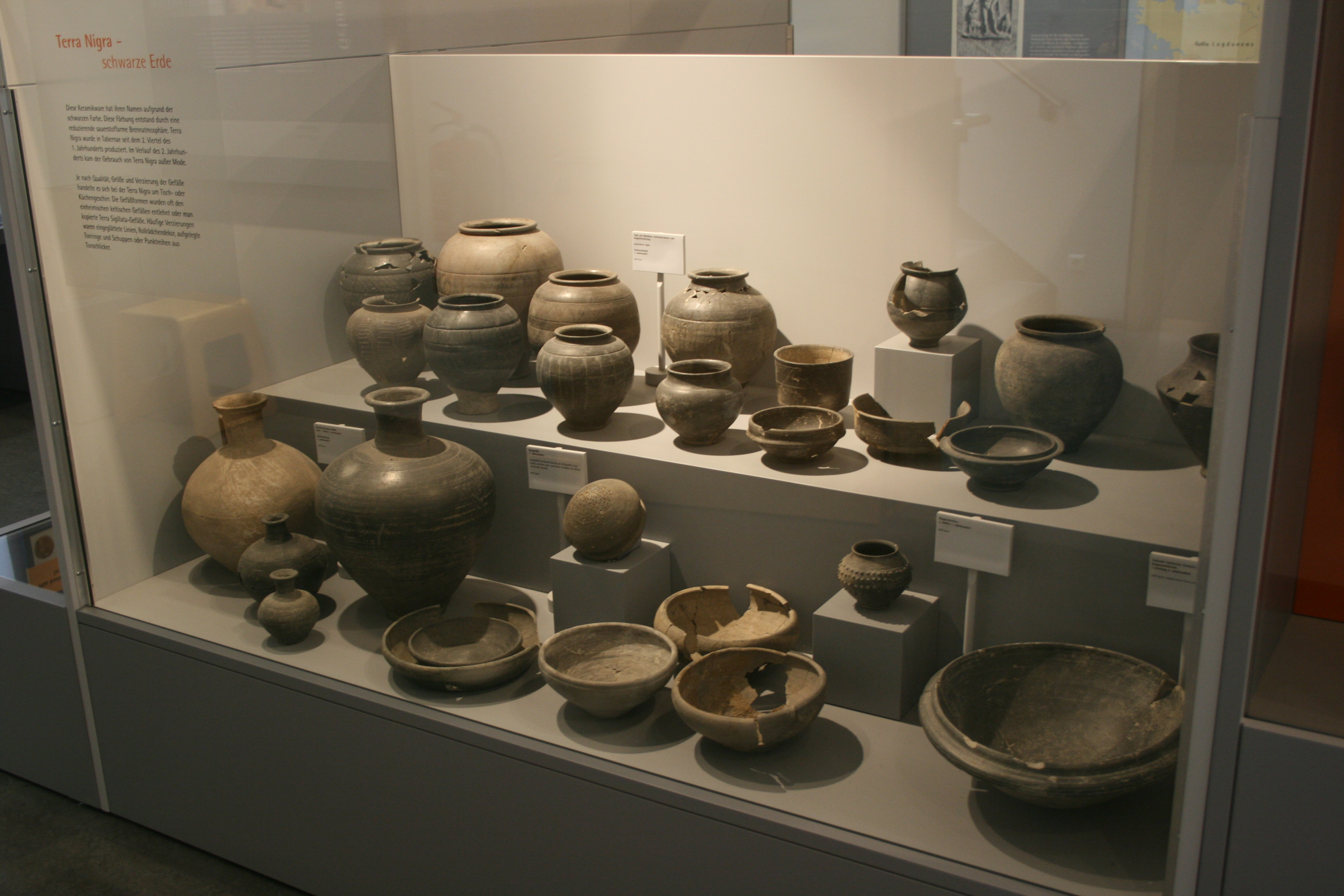 Ausstellung von Terra nigra-Gefäßen im Terra-Sigillata-Museum Rheinzabern.